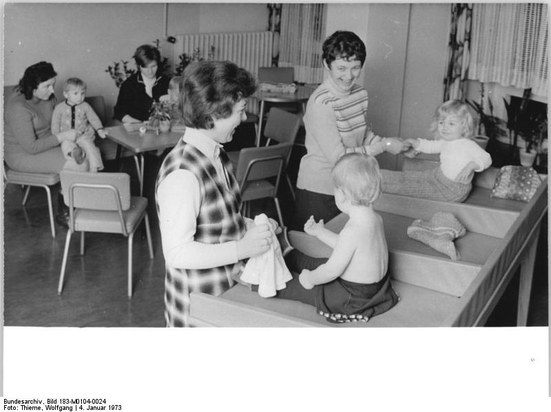 Wartezimmer eines Landambulatoriums ADN-ZB Thieme 4.1.73 Bez. Karl-Marx-Stadt: Für die Genossenschaftsbauern der LPG "Ernst Thälmann" Ehrenberg und "Fortschritt" Grünliehtenberg ist eine vorbildliche ärztliche Betreuung gesichert. Die in den letzten Jahren entstandene Gesundheitseinrichtung garantiert allen LPG-Mitgliedern und der Bevölkerung Vorsorgeuntersuchungen und Hilfe im Krankheitsfalle. Bei der Mutterberatung fühlen sich Muttis und Kinder in den freundlichen Räumen wohl.(vergl. M0104-23N)